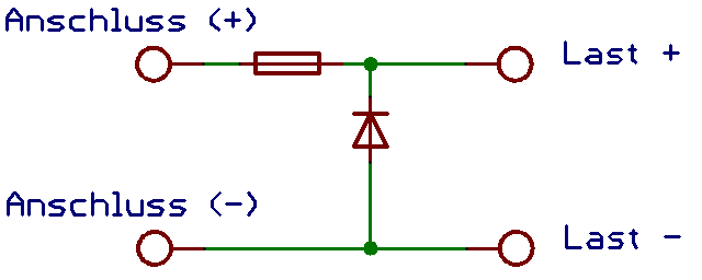 Verpolungsschutz mit parallelgeschalteter Diode. Die Sicherung löst aus, wenn die EINGÄNGE falschpolig angeschlossen werden. Falls die LAST ein KFZ-Akku ist und soll verhindert werden, daß, wenn dieser falschpolig angeschlossen wird, dadurch die Ladeelektronik zerstört, muß an Stelle der im Bild zu sehenden Sicherung eine 3A-Sperrdiode (Pfeil in Richtung Last) eingefügt werden. Die Sicherung kommt dann rechts der (von unten nach oben eingezeichneten) 1A-Rückstromdiode. So ergibt sich bei falscher Polung ein Kurzschluß, der die Sicherung auslöst.